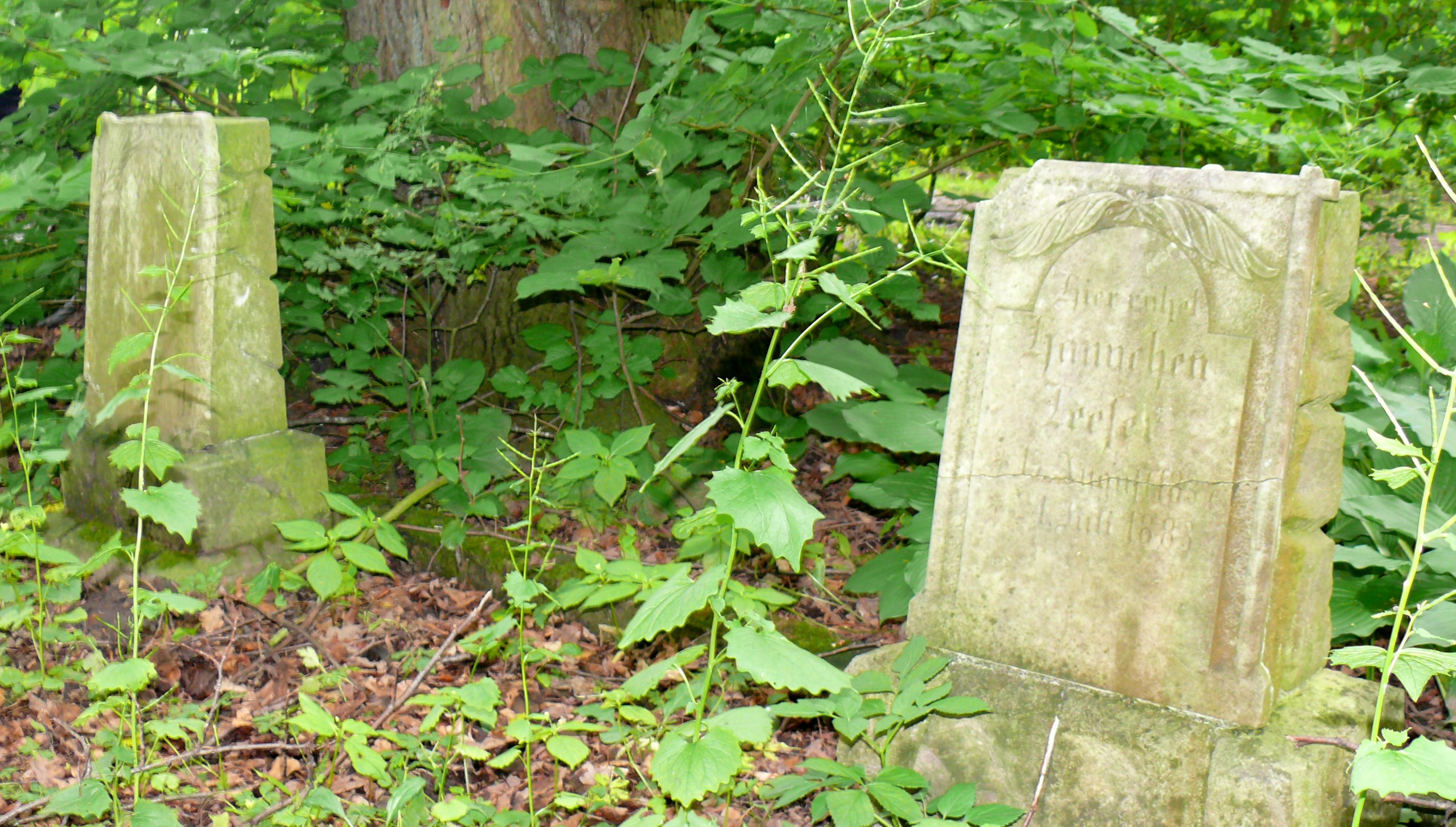 Grabsteine von Ida Leeser (links) und Hannchen Leeser auf dem Hagener jüdischen Friedhof